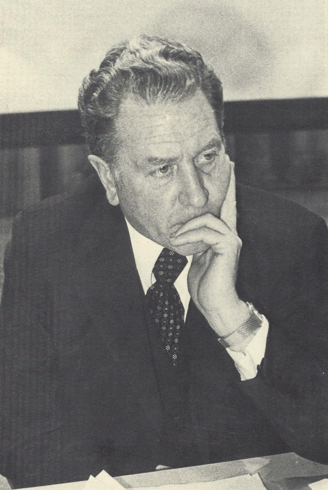 Porträtfotografie des Chirurgen Hans-Wilhelm Schreiber.